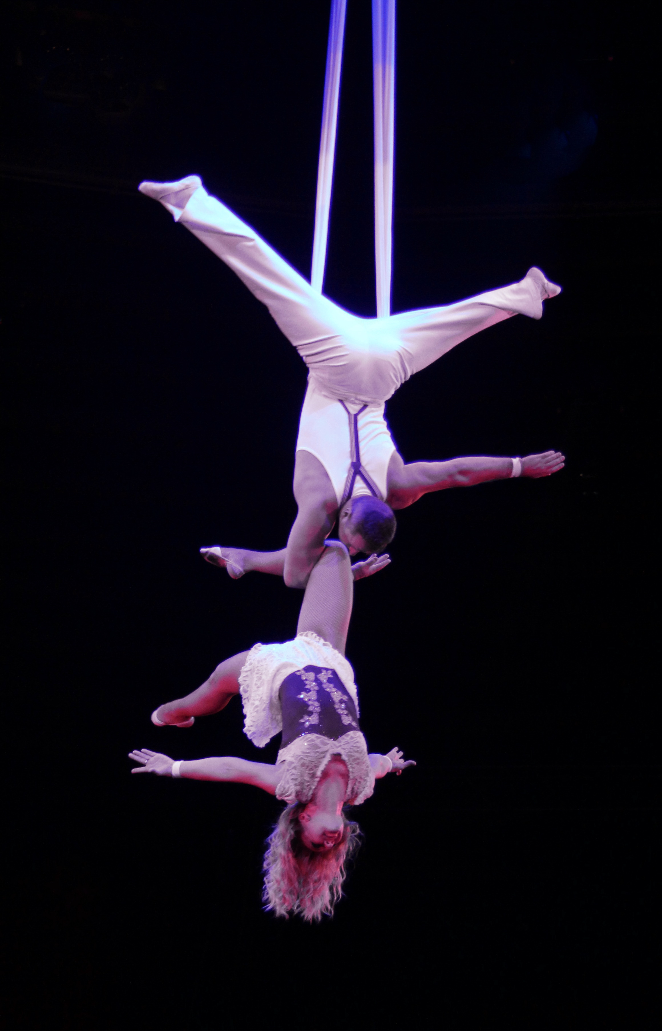 Vorstellung im Zirkus Krone.